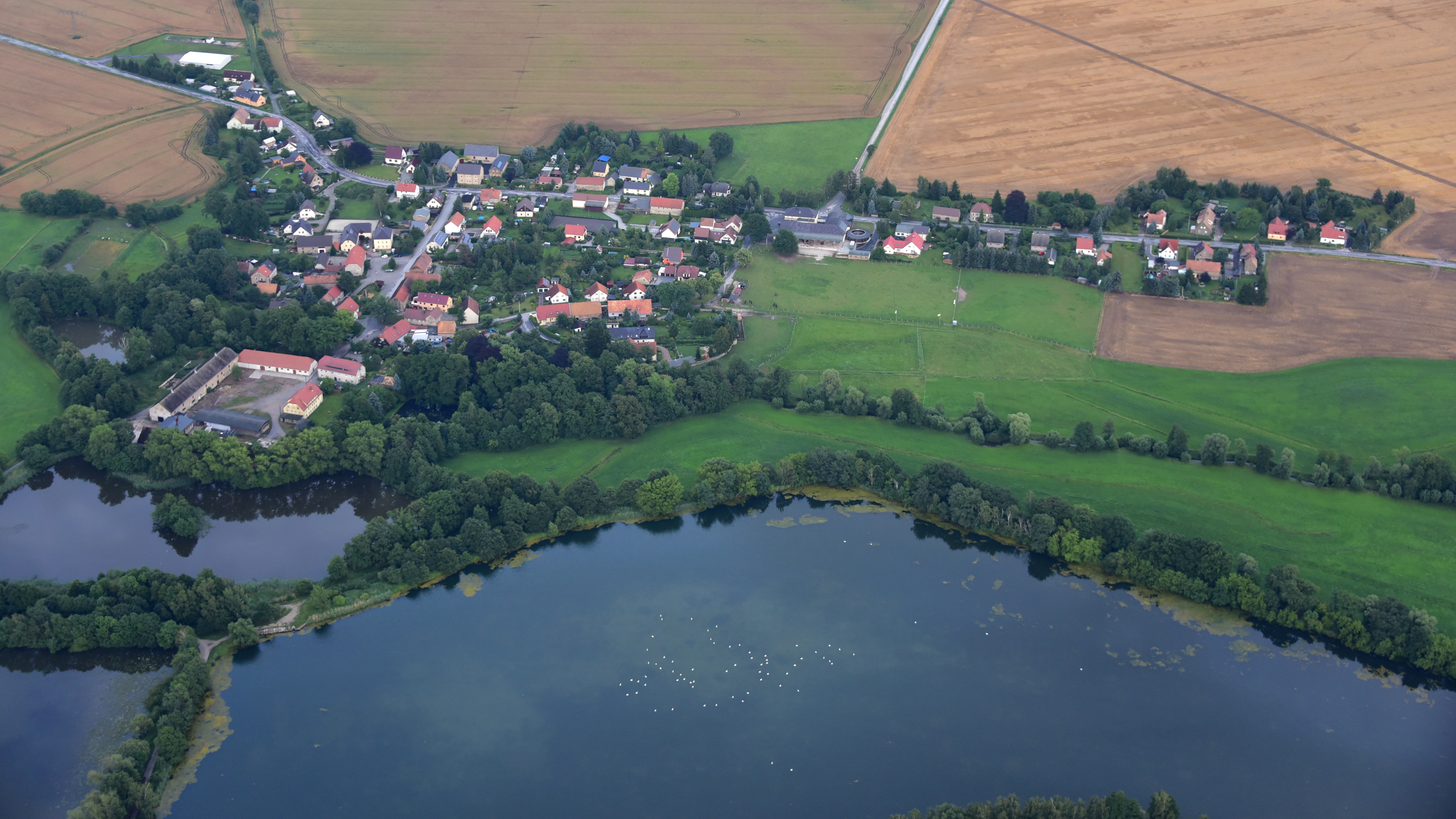 Pließkowitz, Luftaufnahme (2017) Hornjoserbsce: Powětrowy wobraz Plusnikec